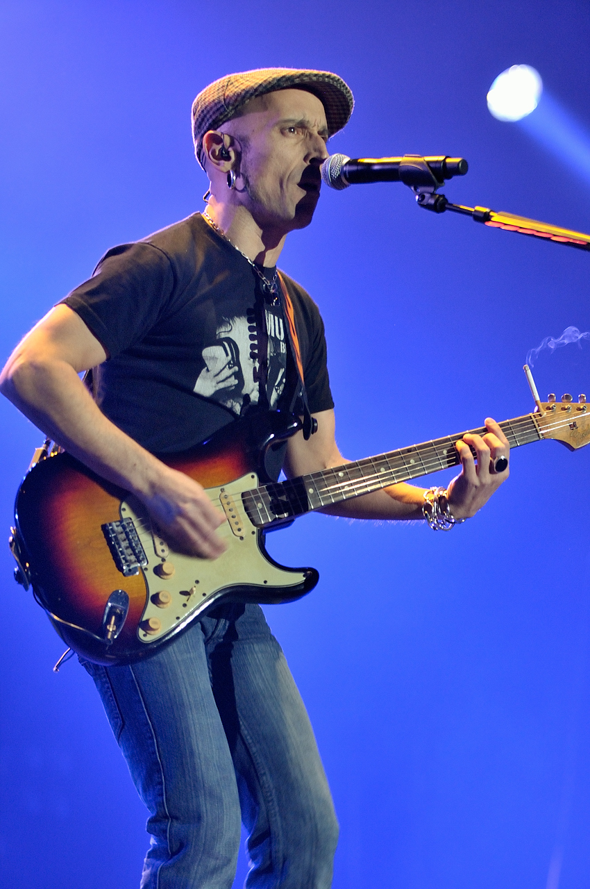 Fito & Fitipaldis en el Palau Sant Jordi de Barcelona el 13 de diciembre de 2009.